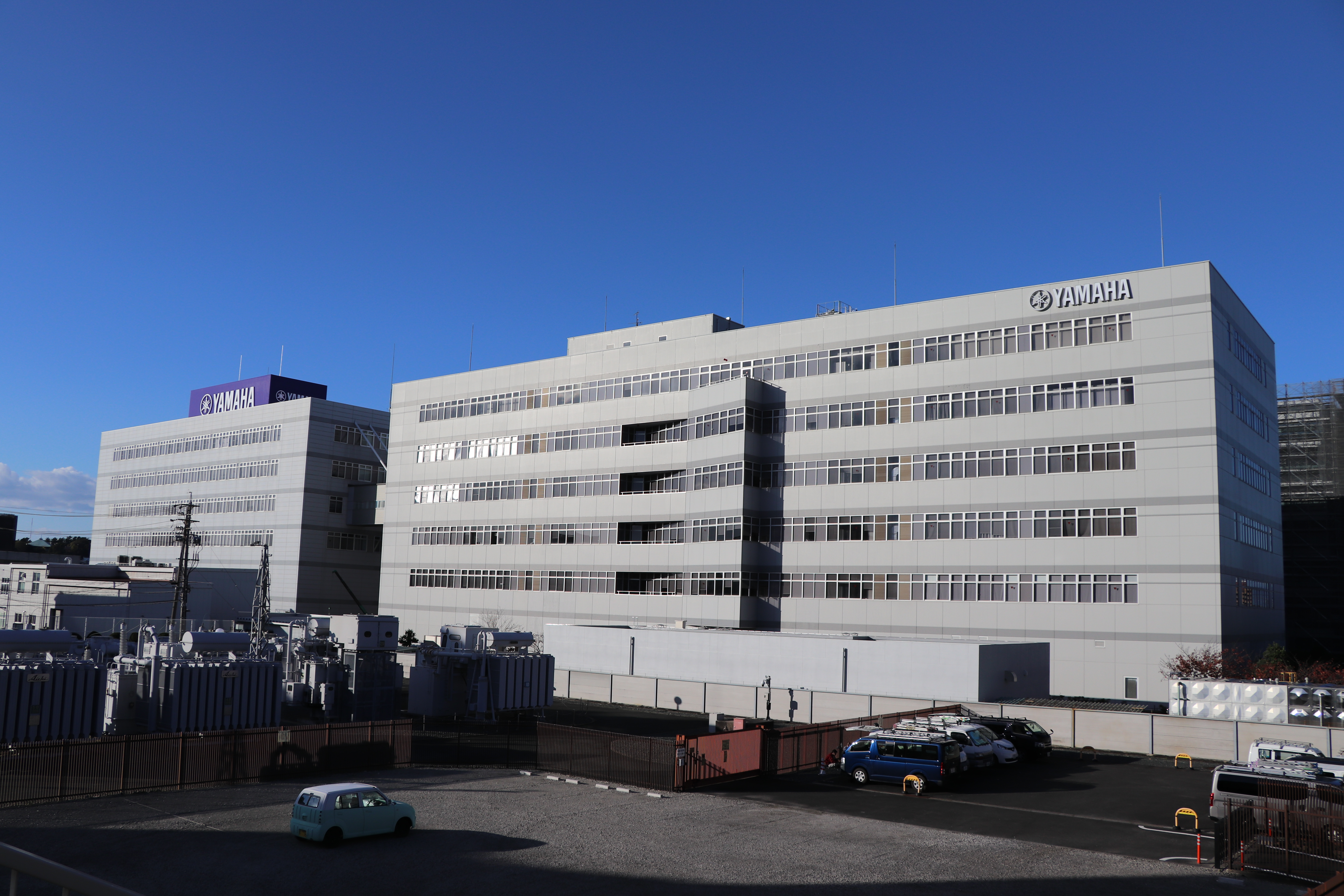 ヤマハ株式会社 本社ビル